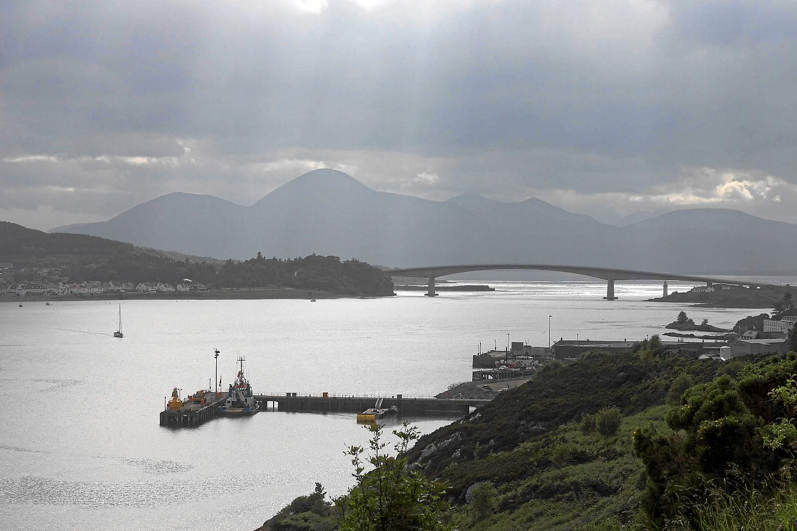 Brücke von Kyle of Lochalsh zur Insel Skye in Schottland